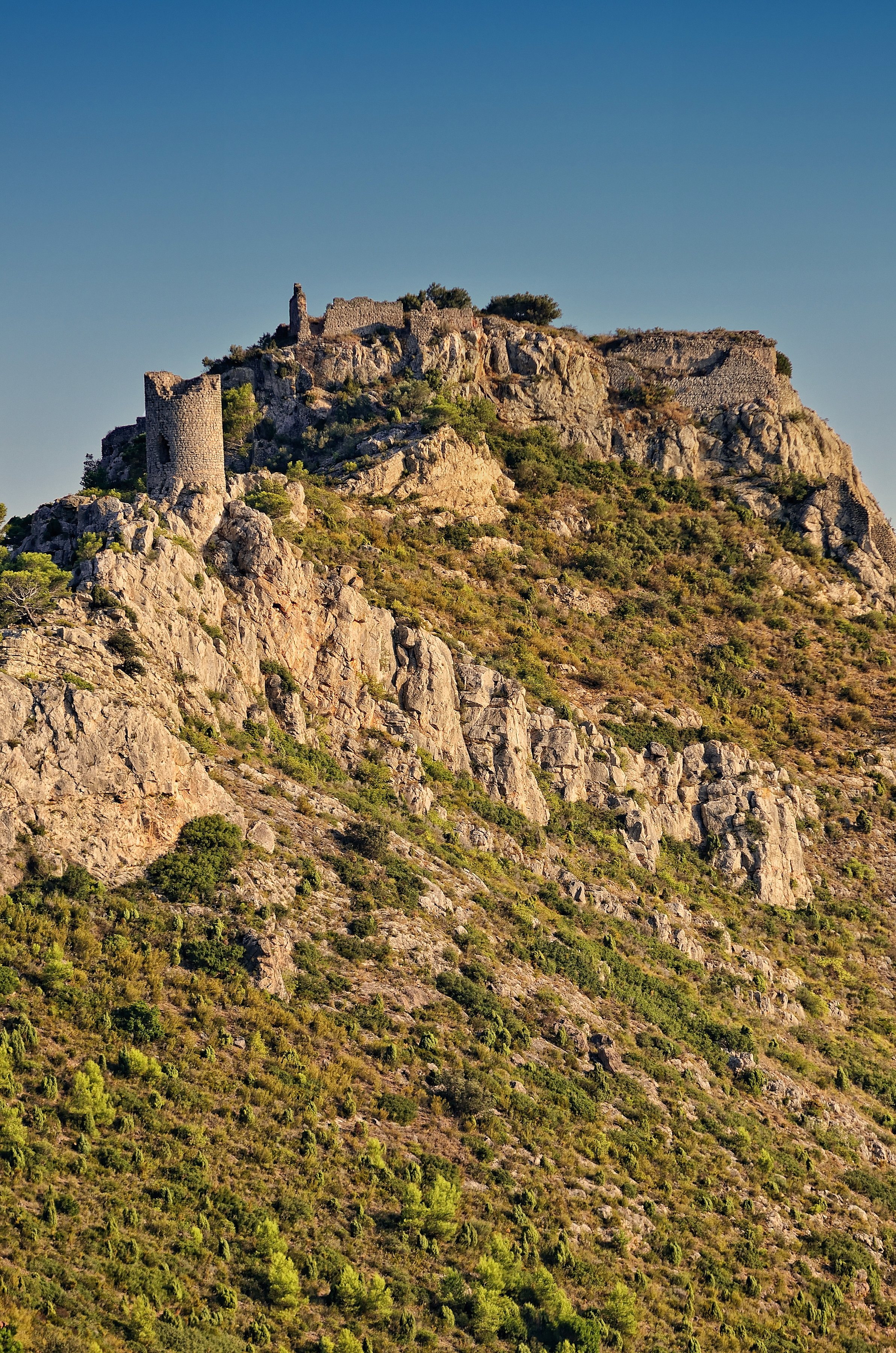 Castell de Montornés, a Benicàssim (Plana Alta)